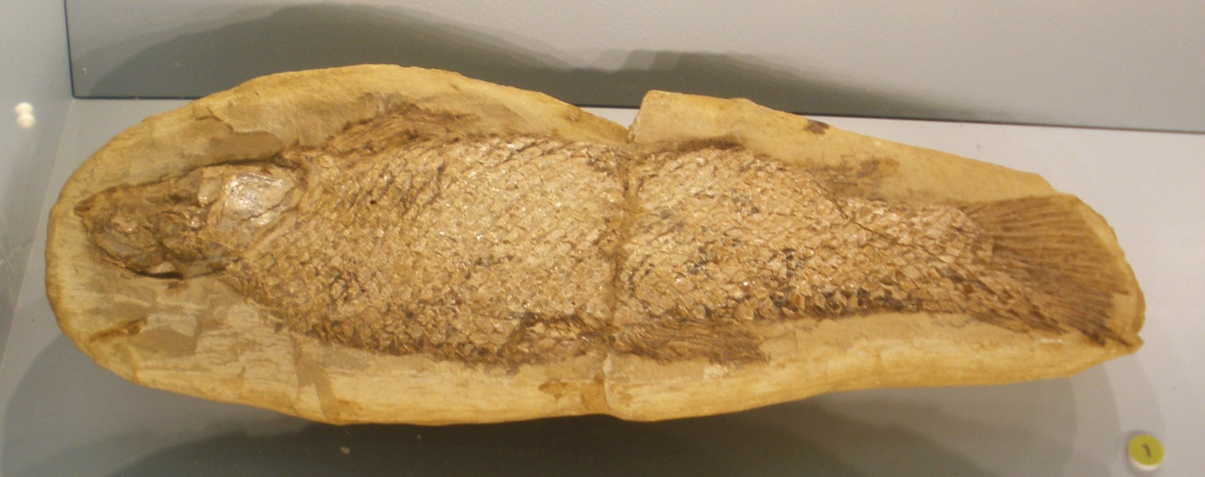 Fossil of Notelops, an extinct fish Took the photo at Musee d'Histoire Naturelle, Brussels